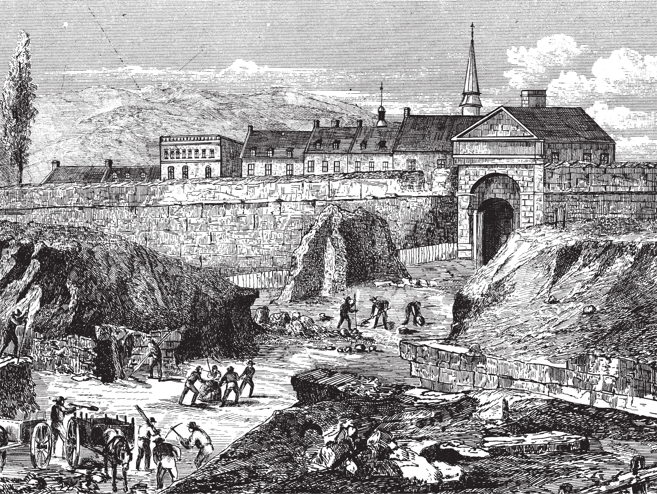 Destruction de la porte Saint-Louis